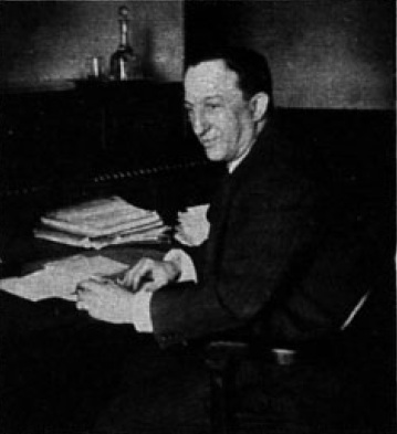 Benjamín Cohen Gallerstein en 1936. Benjamín Alberto Cohen Gallerstein, (Concepción, 18 de marzo de 1896- Nueva York, 12 de marzo de 1960) Diplomático chileno.